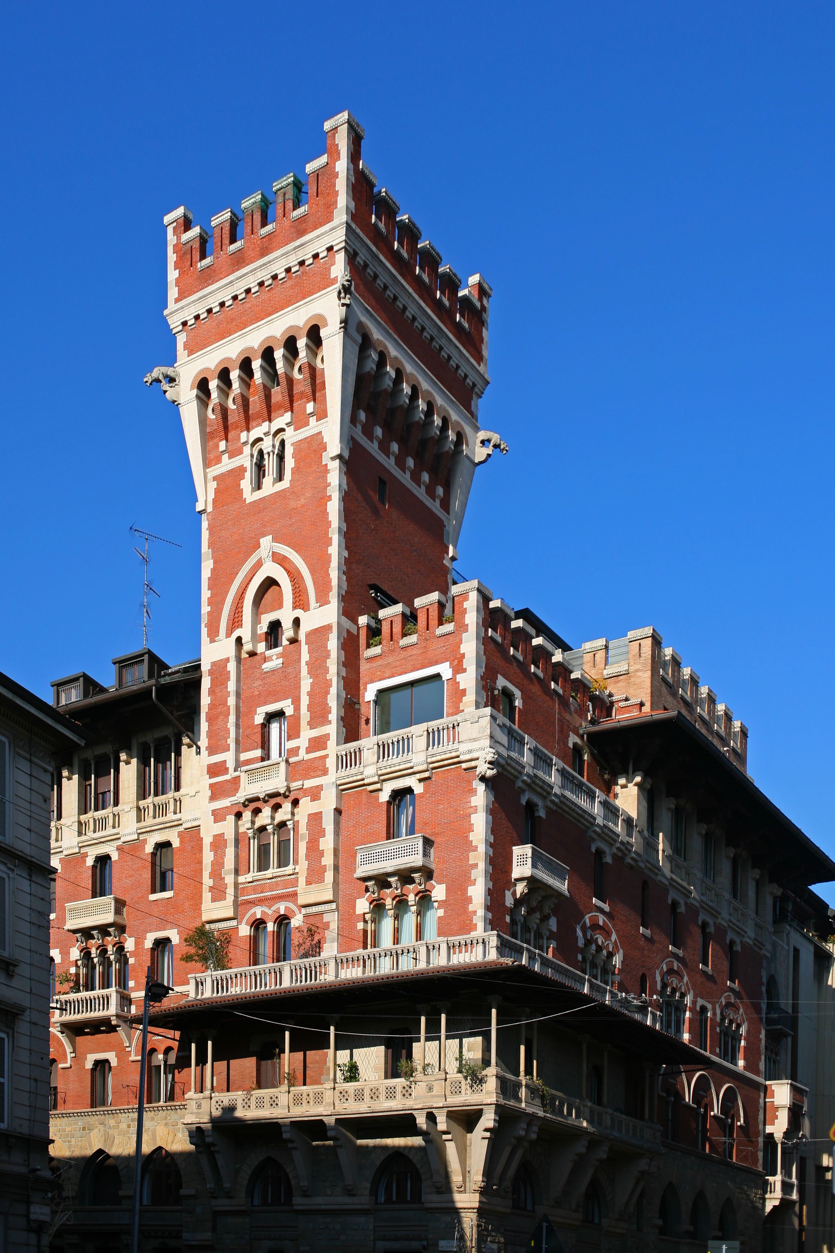 Veduta di tre quarti del Castello Cova di Milano